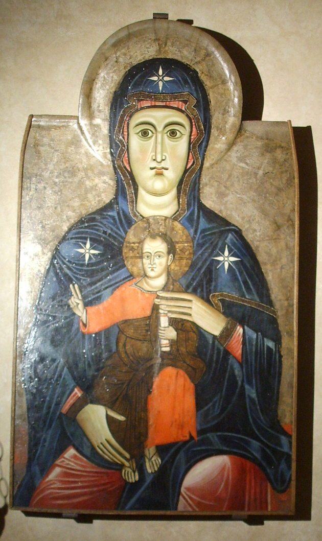 Duomo di fiesole, Madonna in trono col Bambino, ante 1230